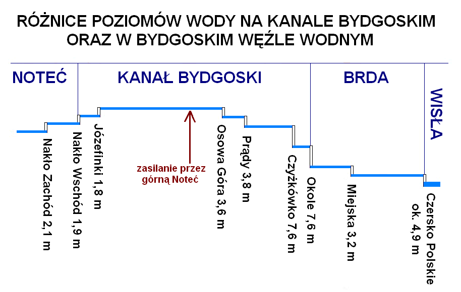 Schemat poziomów wody na Kanale Bydgoskim i w Bydgoskim Węźle Wodnym. Opracowano na podstawie schematu zamieszczonego w